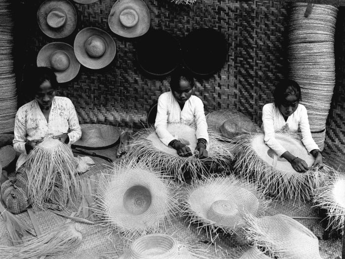 Foto. Mogelijk is deze foto gemaakt op het terrein van een tentoonstelling of jaarmarkt.. Het vlechten van hoeden van bamboe